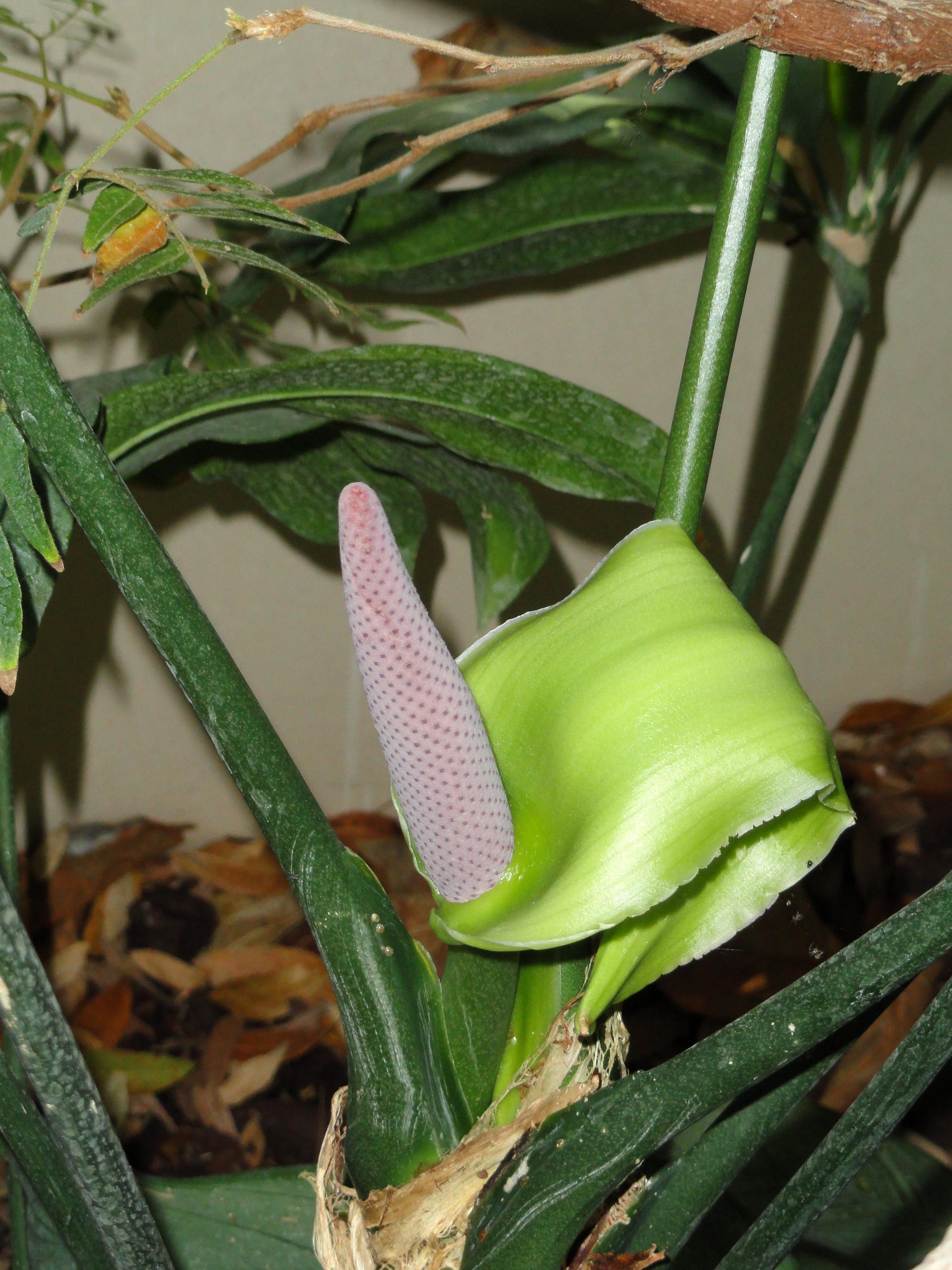 Anthurium digitatum specimen in the Jardin Botanique de Lyon, Parc de la Tête d'Or, Lyon, France.